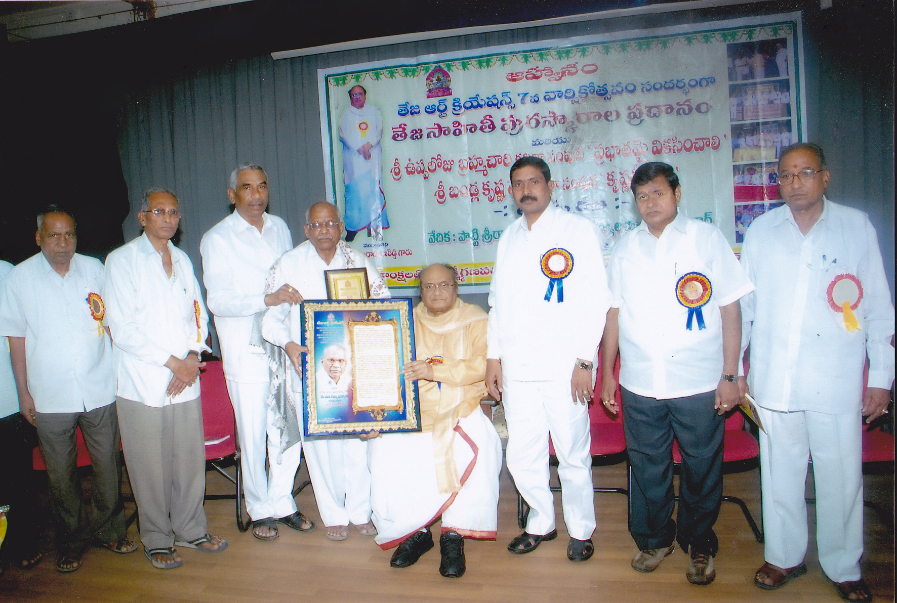 ఆచార్య సి.నారాయణ రెడ్డి గారిచే జీవన సాఫల్య పురస్కారం